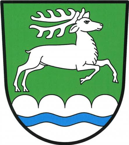 Běleč, Brno venkov. znak